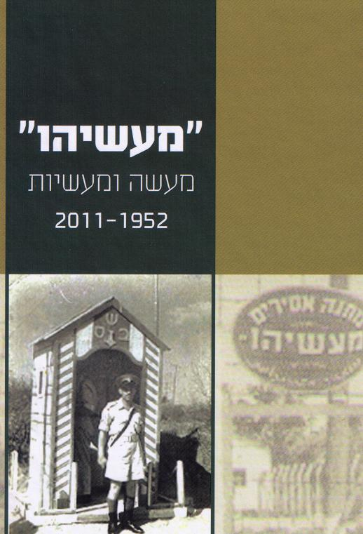 מרדכי מוטי ירושלמי, כריכת הספר מעשיהו - מעשה ומעשיות